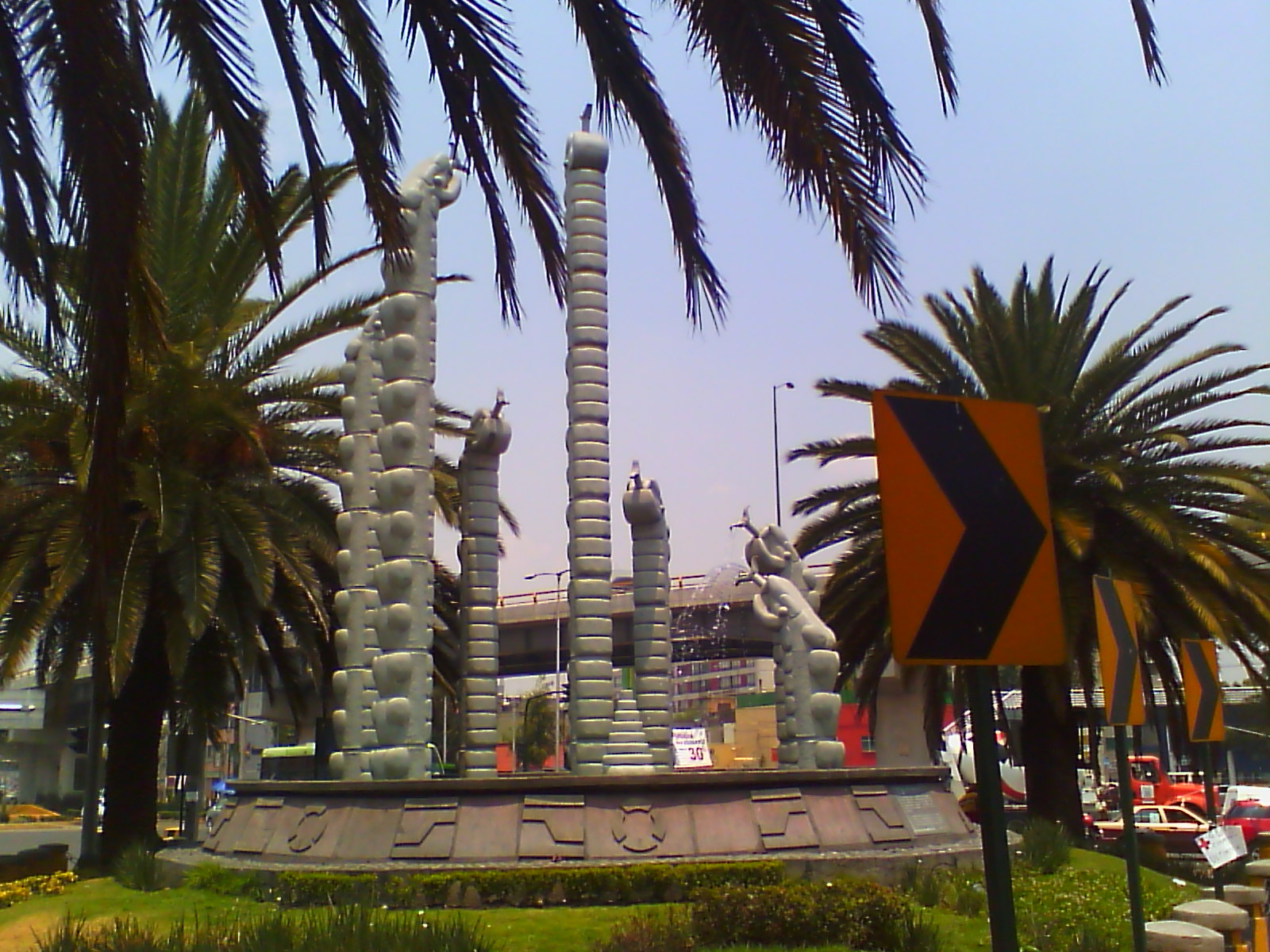 Escultura Mixcoac